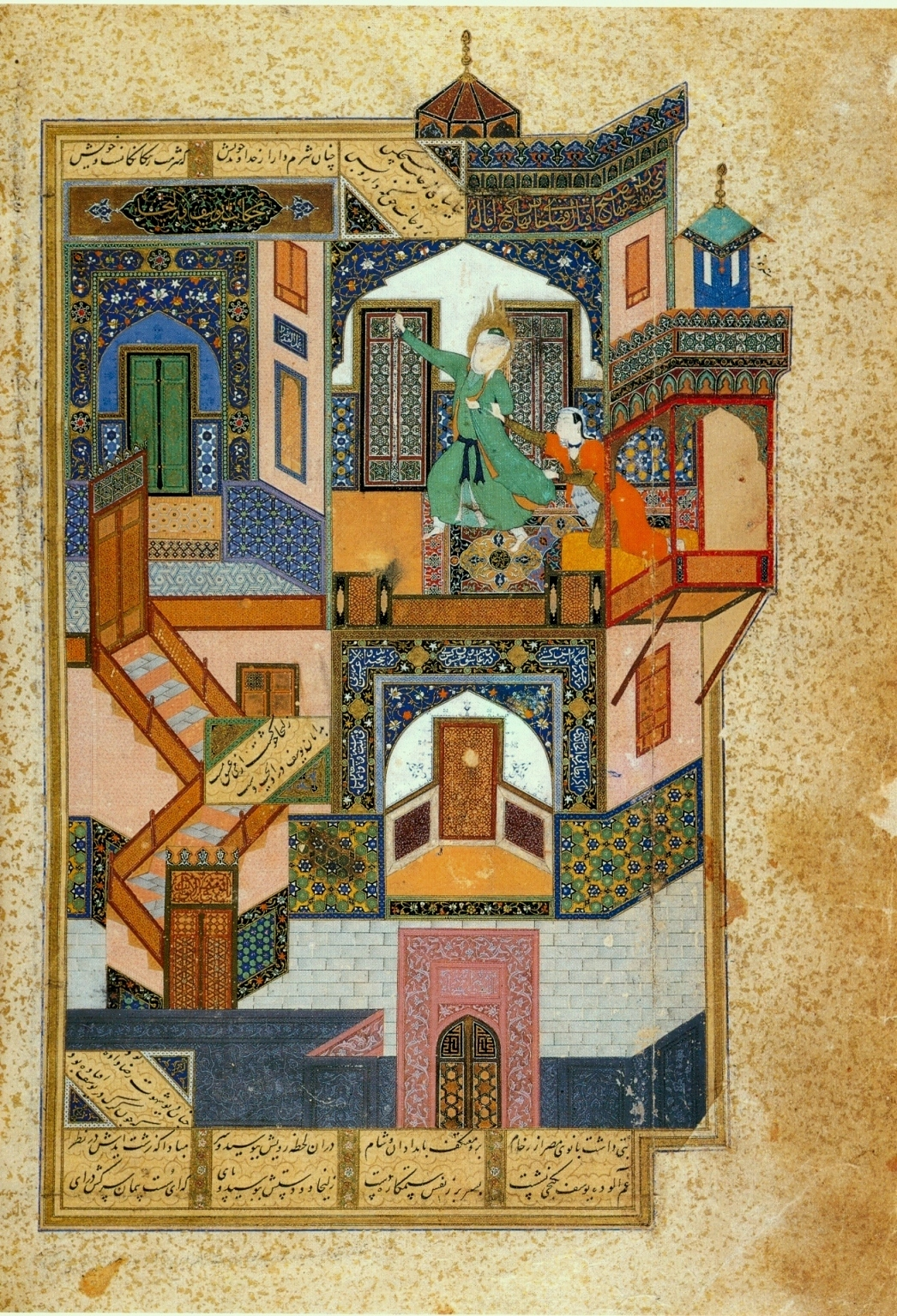 BIHZAD, Yusef vlucht voor Zuleykha (Jozef en de vrouw van Potifar), 1488, Herat, Afghanistan